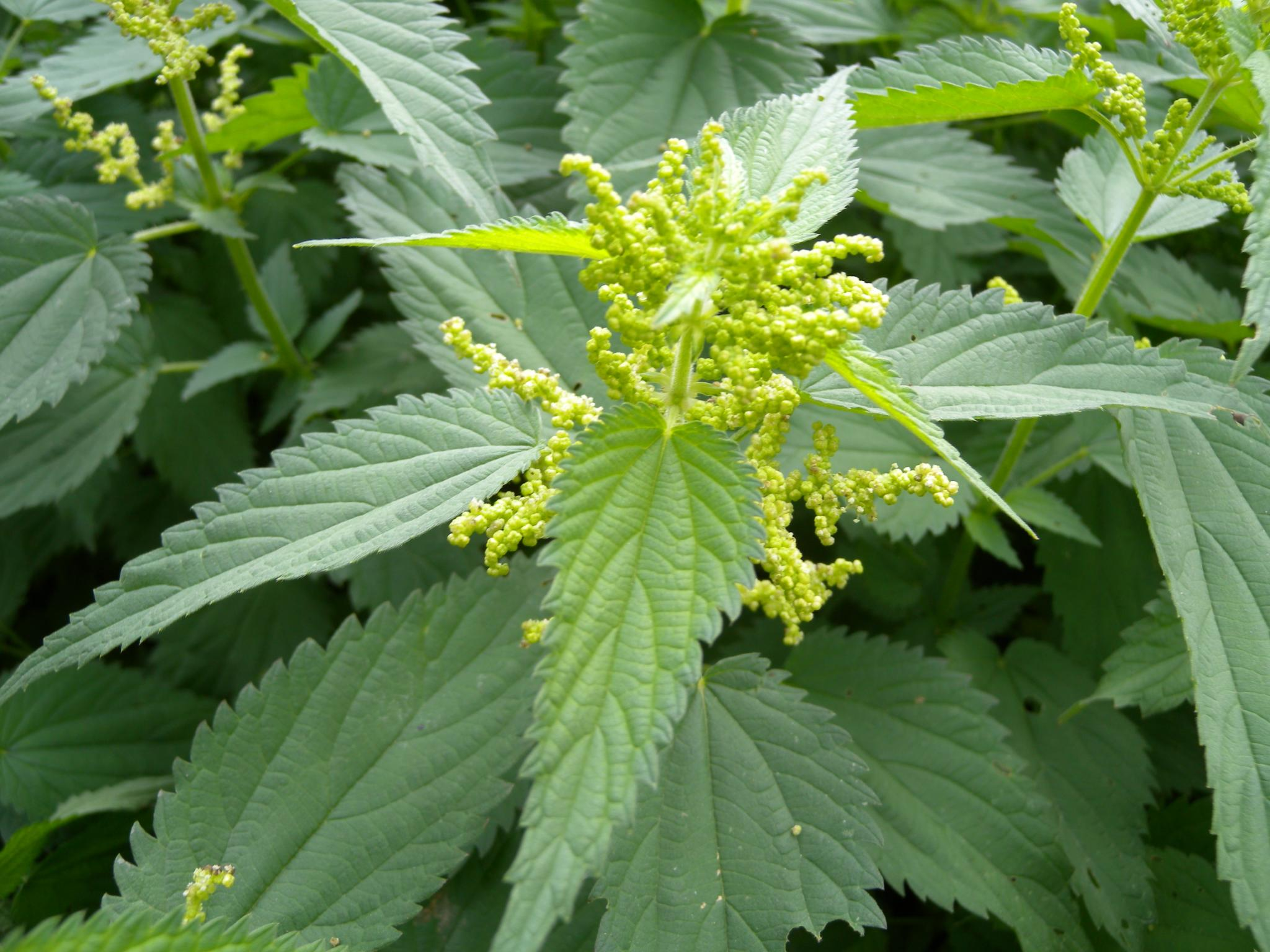 Brennnessel